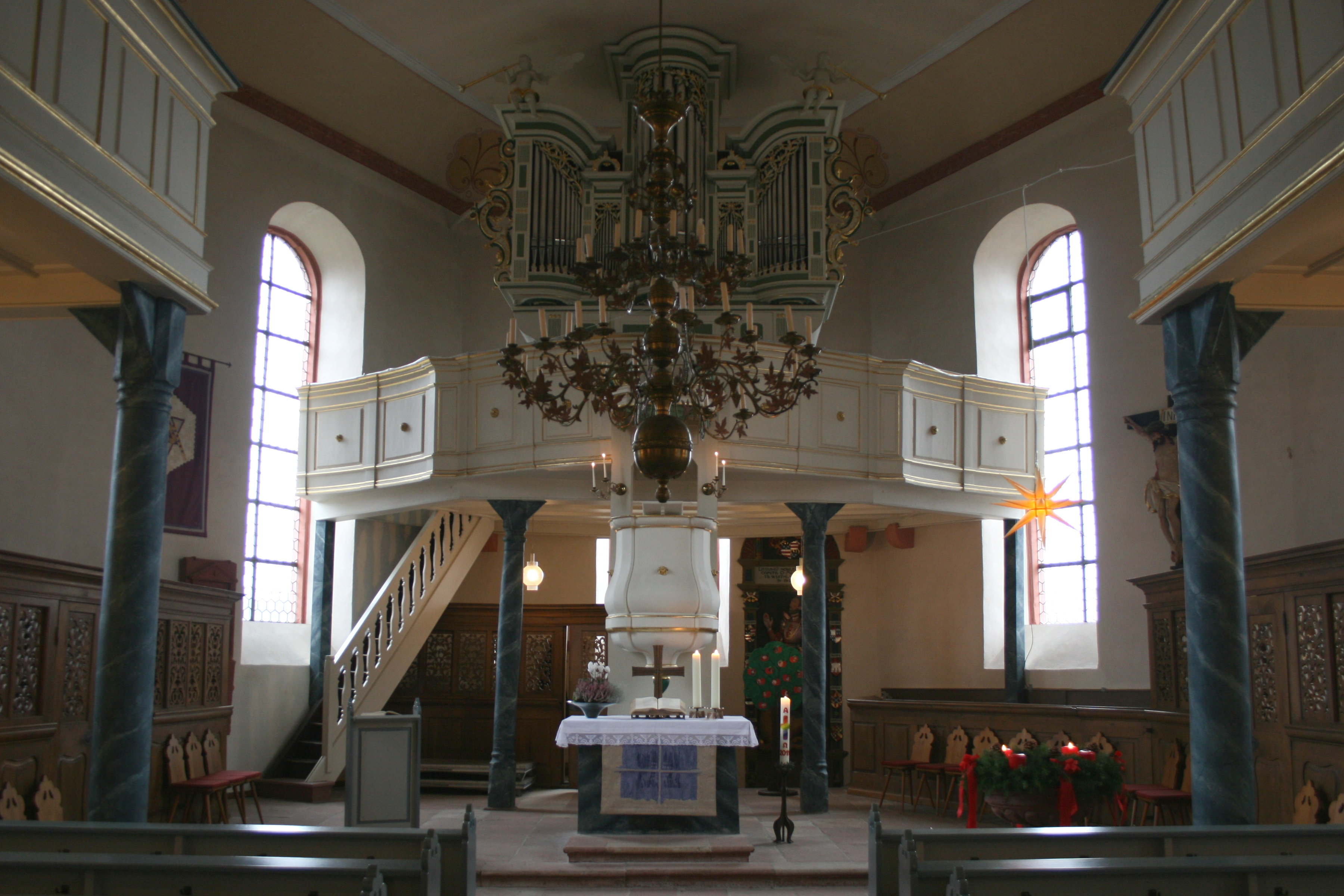 Evangelische Kirche Sandbach, Blick in den Innenraum auf den Chor.